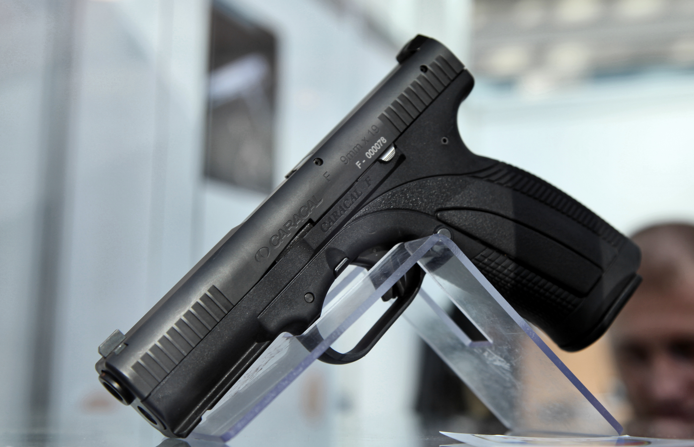 9x19 Caracal F